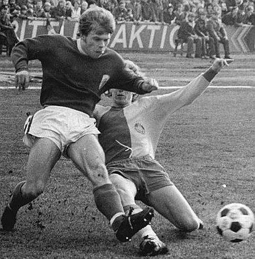 Title: FC Carl Zeiss Jena - 1.FC Lok Leipzig 1:1 Factual corrections and alternative descriptions are encouraged separately from the original description. Additionally errors can be reported at this page to inform the Bundesarchiv. Original historic description: ADN-ZB-Liebers-13.3.76-str-Bez.Gera: Fußball-Oberliga FC Carl Zeiss Jena-1.FC Lok Leipzig1: 1-Zweikampf zwischen Roland Dammer (Leipzig-l.) und Klaus Schröder.Im Kampf zweier um einen Medaillenplatz der Meisterschaft 1975-76 bemühten Mannschaften hatten die Gastgeber zwar Spielvorteile, konnten aber keine eindeutige Entscheidung zu ihren Günsten erreichen.